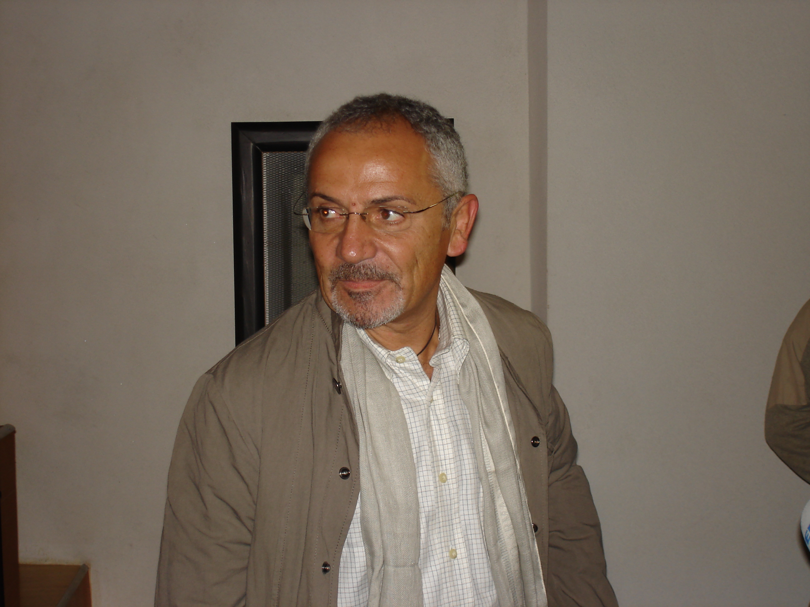 Савік Шустер у Харківському національному університеті імені В. Н. Каразіна під час презентації телевізійного проекту «Великі українці».м. Харків, 11 вересня 2007 року